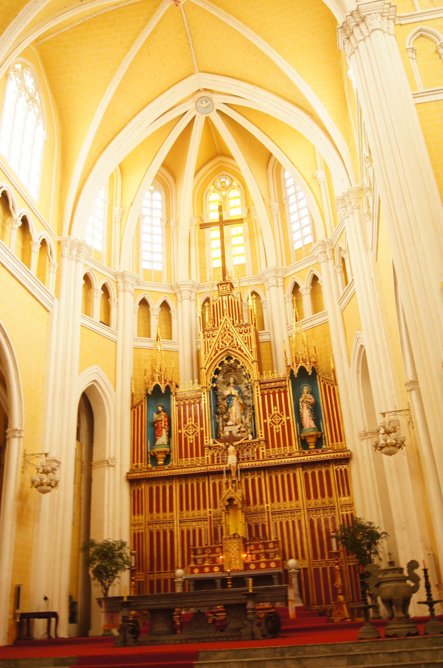 Cung thánh của nhà thờ Phú Nhai